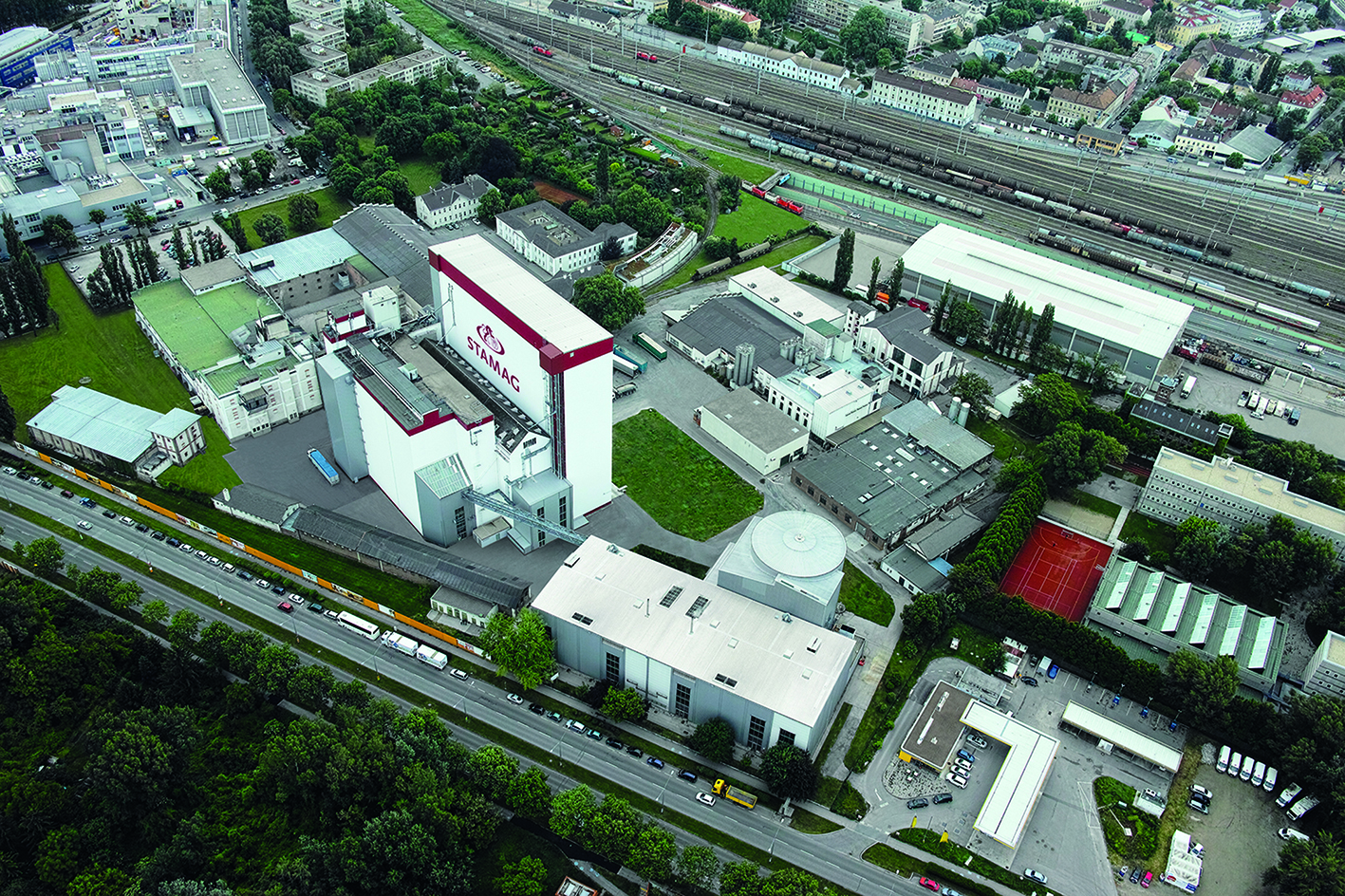 Ansicht des Firmensitzes von STAMAG Stadlbauer Malzfabrik GesmbH